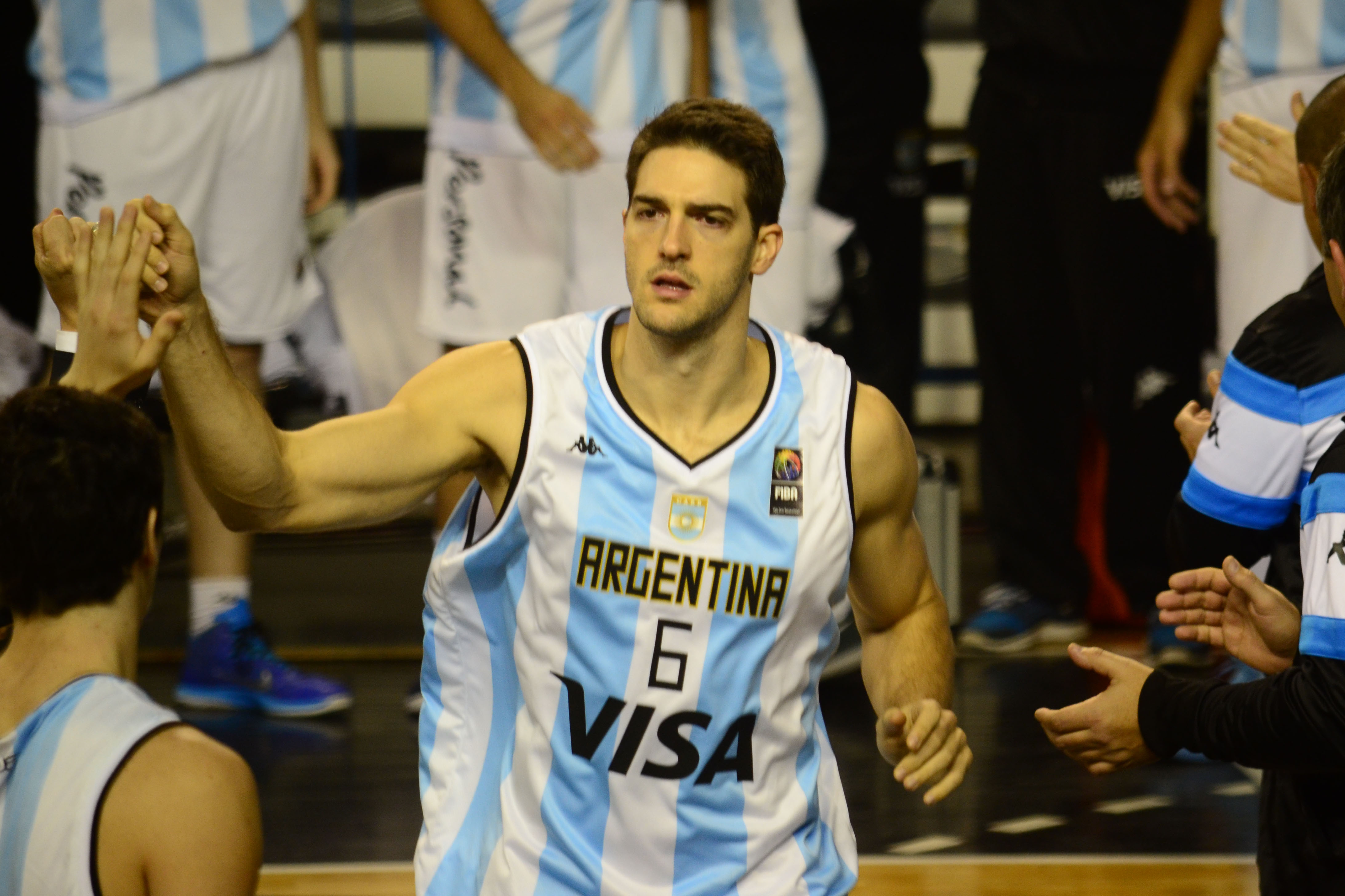 Marcos Mata